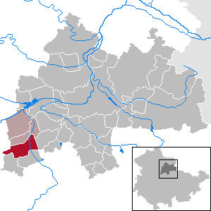 Walschleben in Thuringia - District Sömmerda